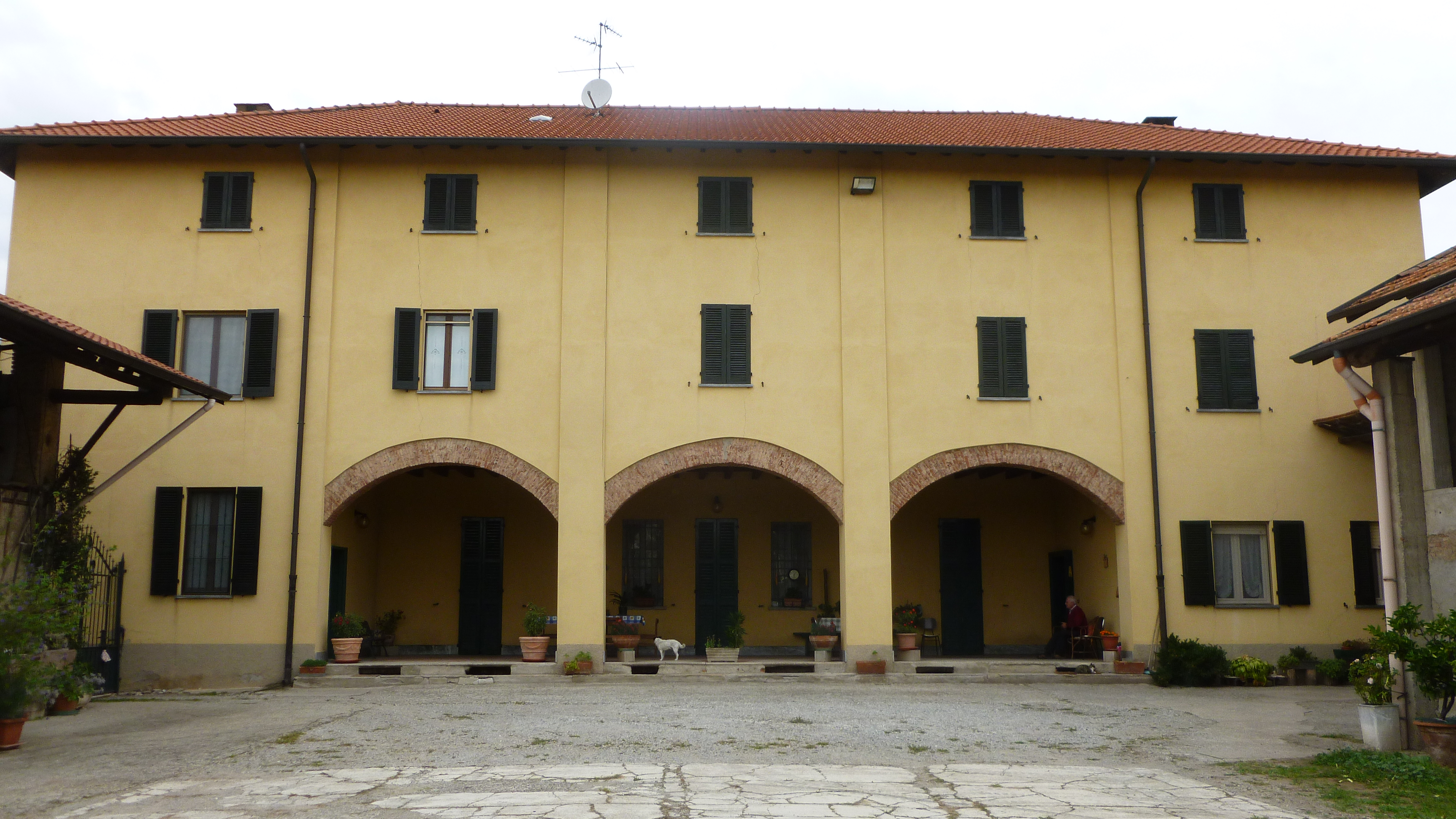 Cascina Modesta Brugherio (MB) This is a photo of a monument which is part of cultural heritage of Italy.